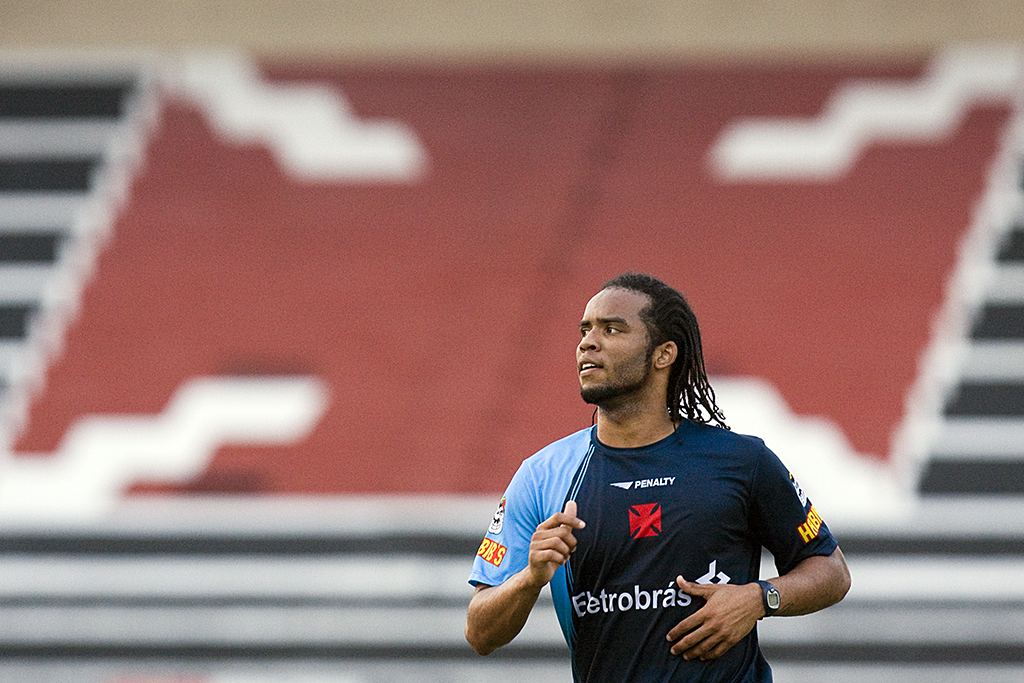 Treino do Vasco em São Januário